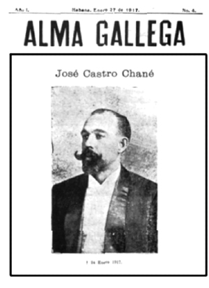 Alma Gallega, Habana, 27_01_1917, núm. 4